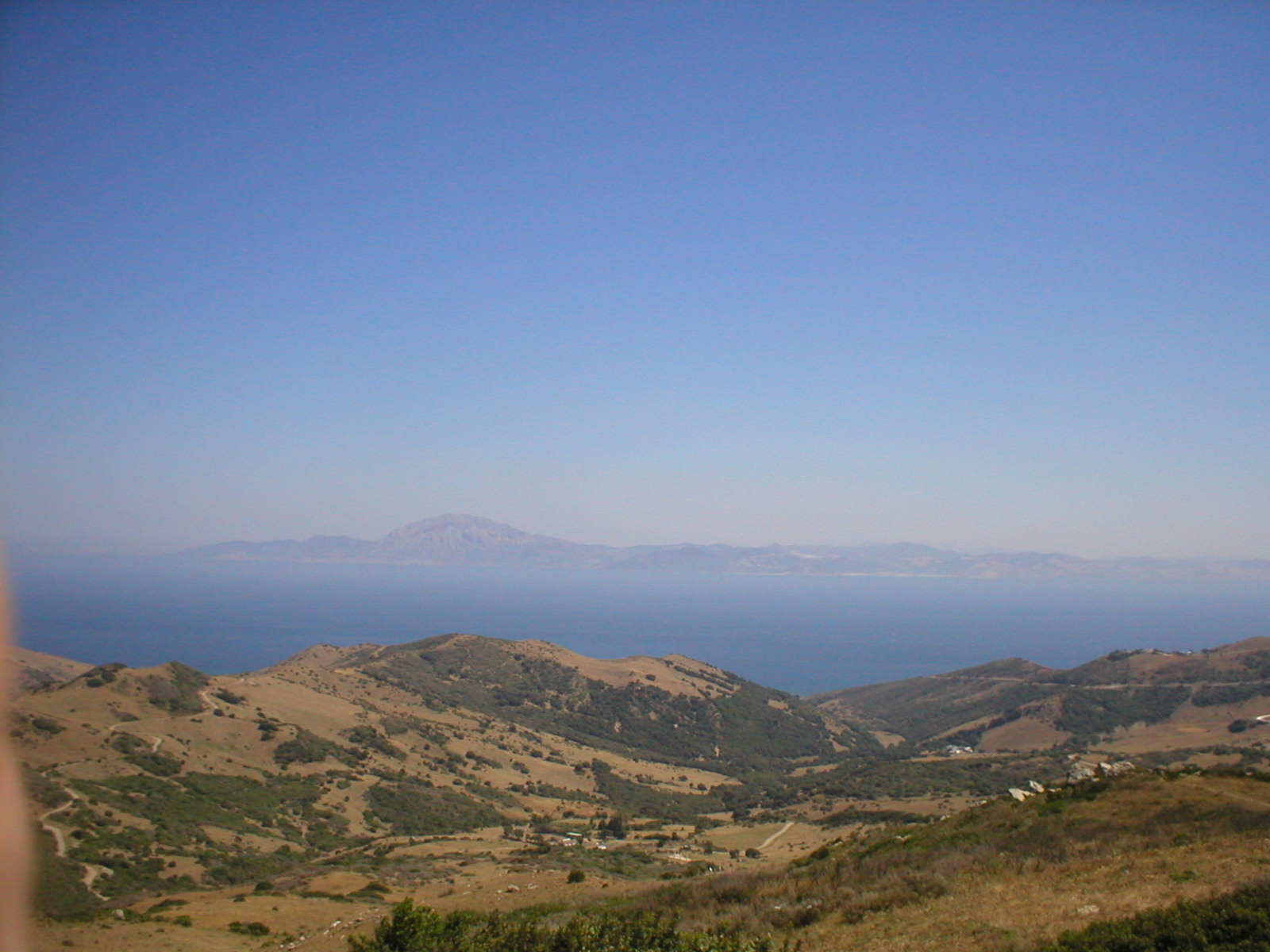 Pohled na marocké území ze Španělska, před Gibraltarskou úžinu